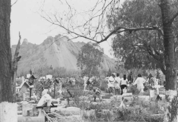 Volcán Yohualiuhqui, desde el Panteón Civil de San Lorenzo Tezonco en Iztapalapa, México, D. F., México.